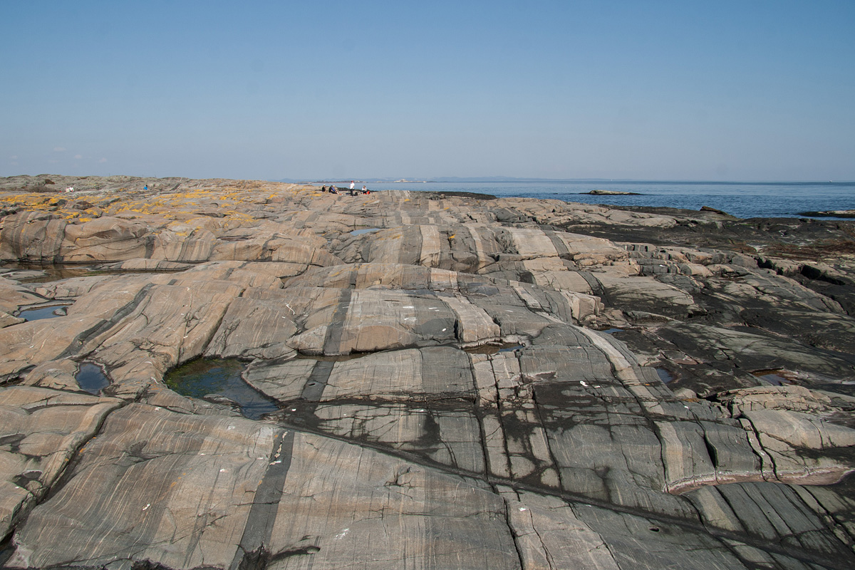 Svaberg på Vestre Saltstein i Jomfruland nasjonalpark.